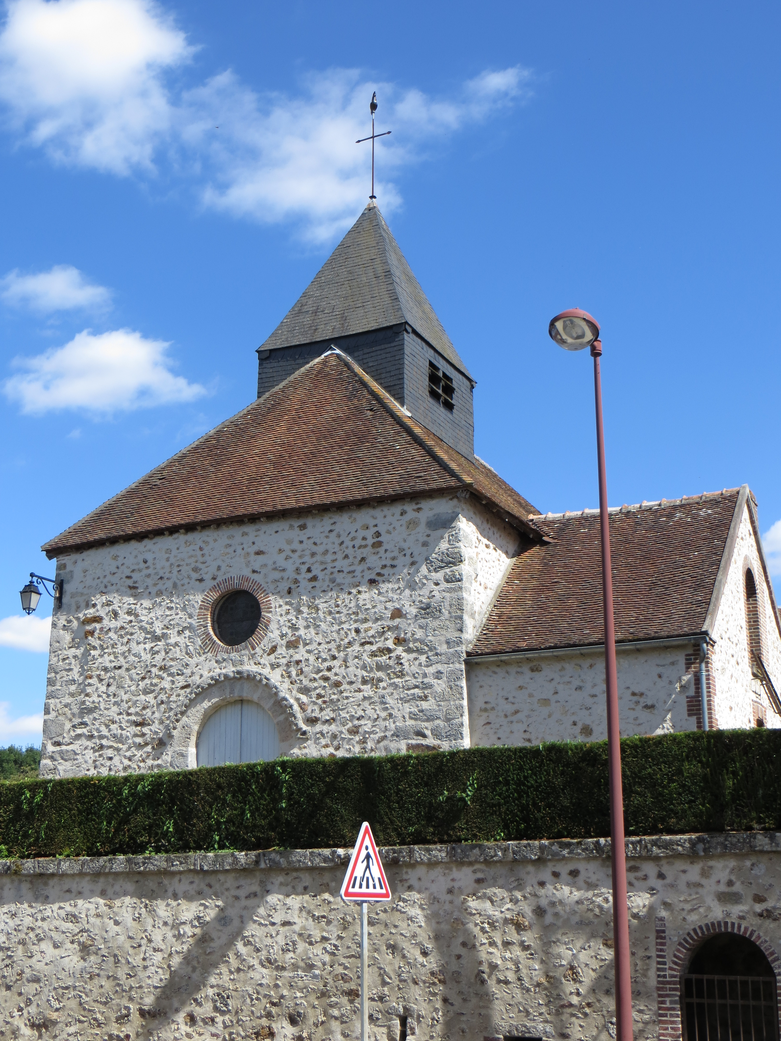 Aperçu de l'église